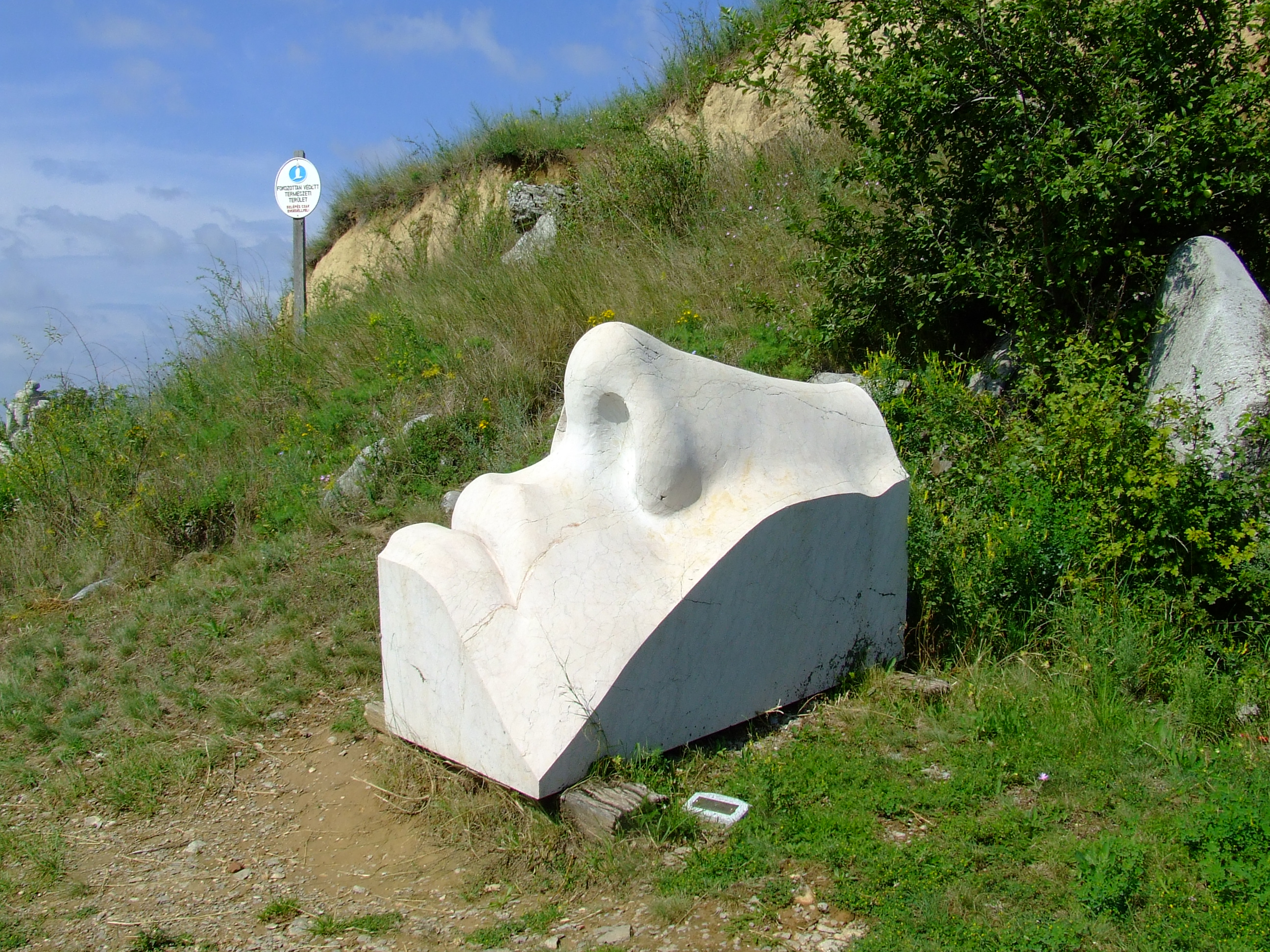 Bencsik István Arc (Madonna) című műve (siklósi sárga márvány, 1981) a villányi (nagyharsányi) szabadtéri szoborparkban